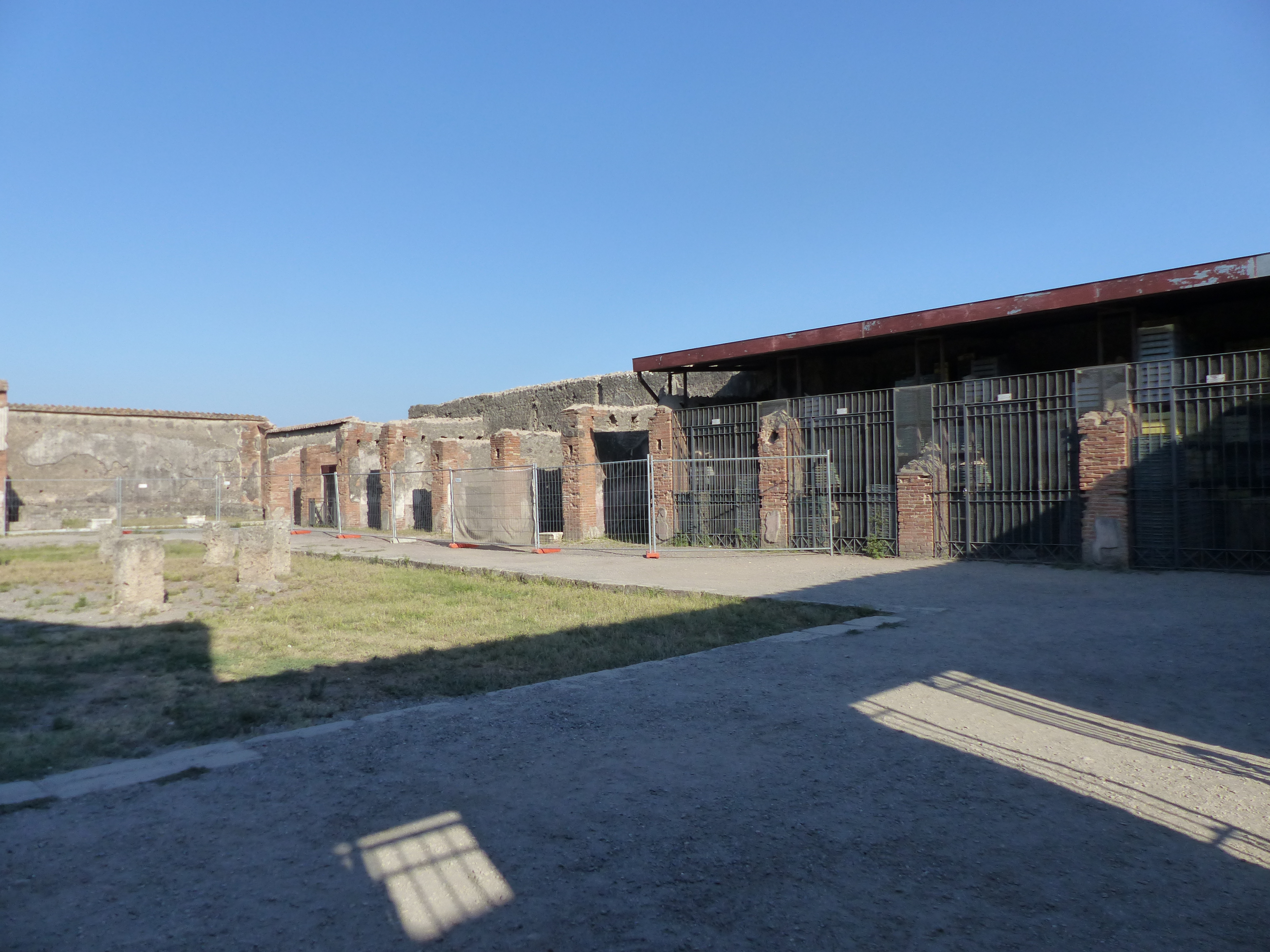 Macellum de Pompeya